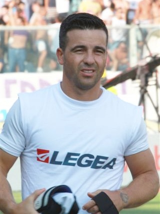 Antonio di Natale, calciatore italiano.